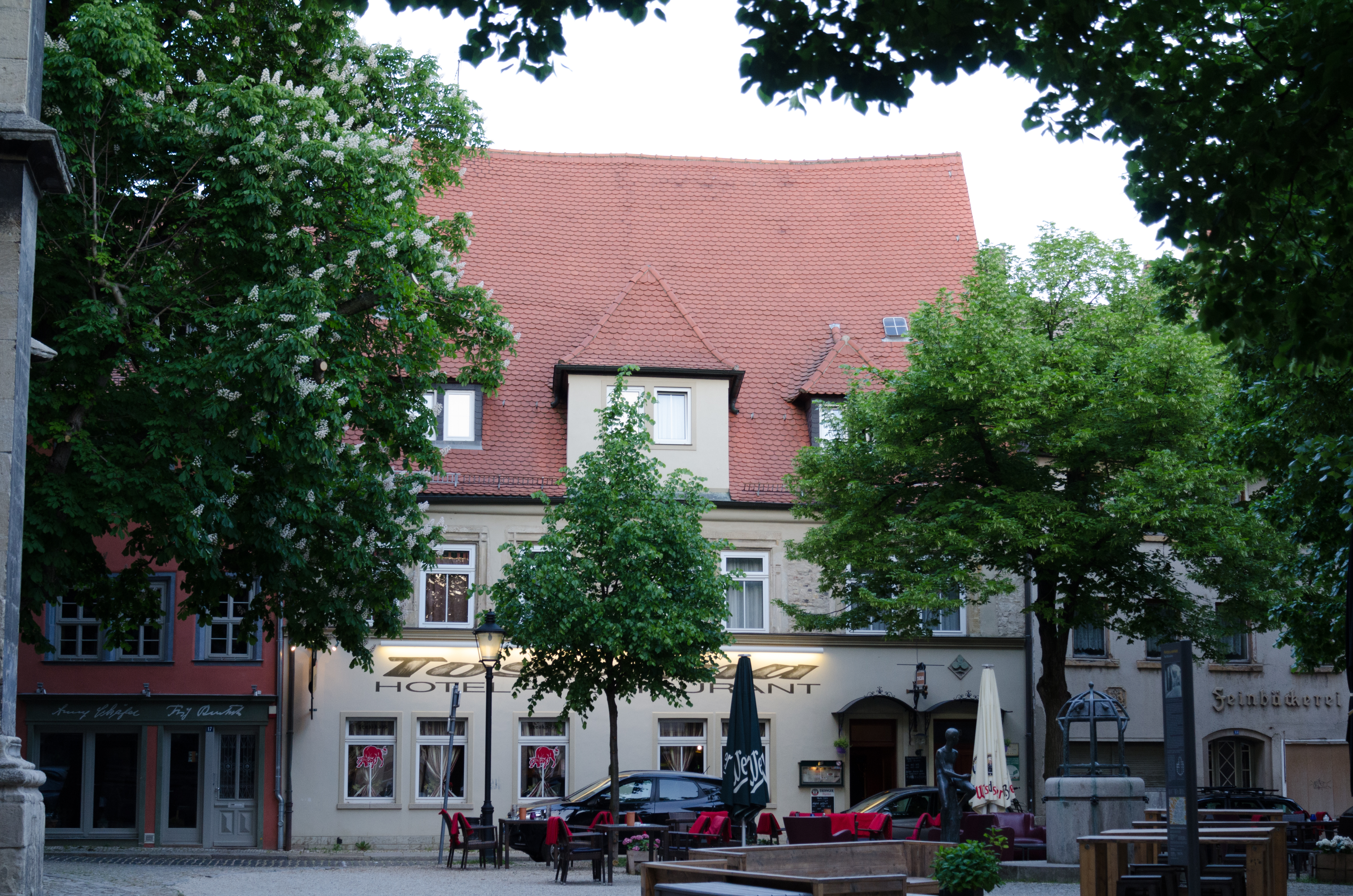 Naumburg, Topfmarkt 16